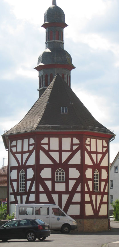 Dorfkirche Dirlammen